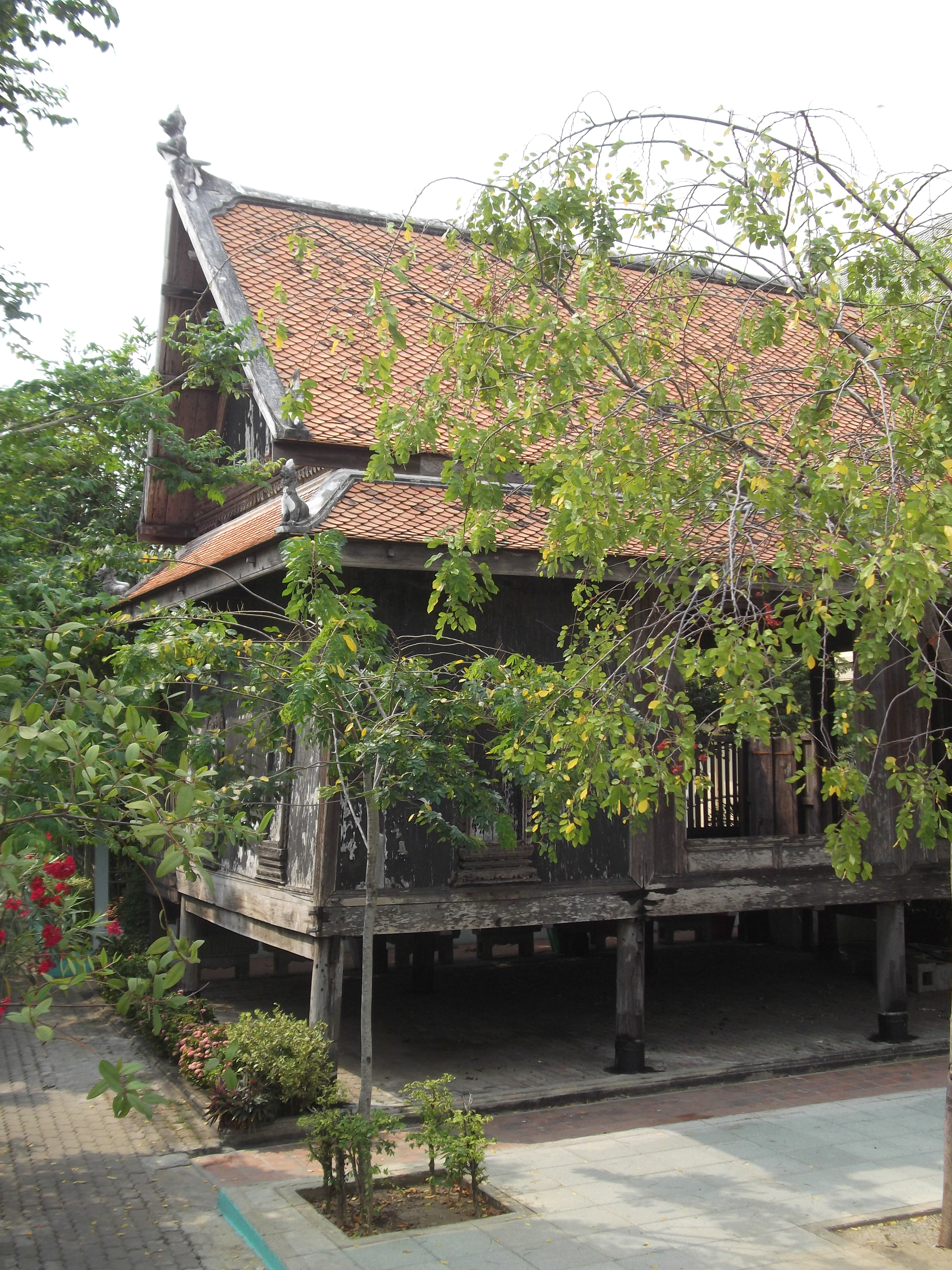 วัดไทร